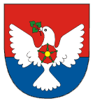 Znak obce Růžďka